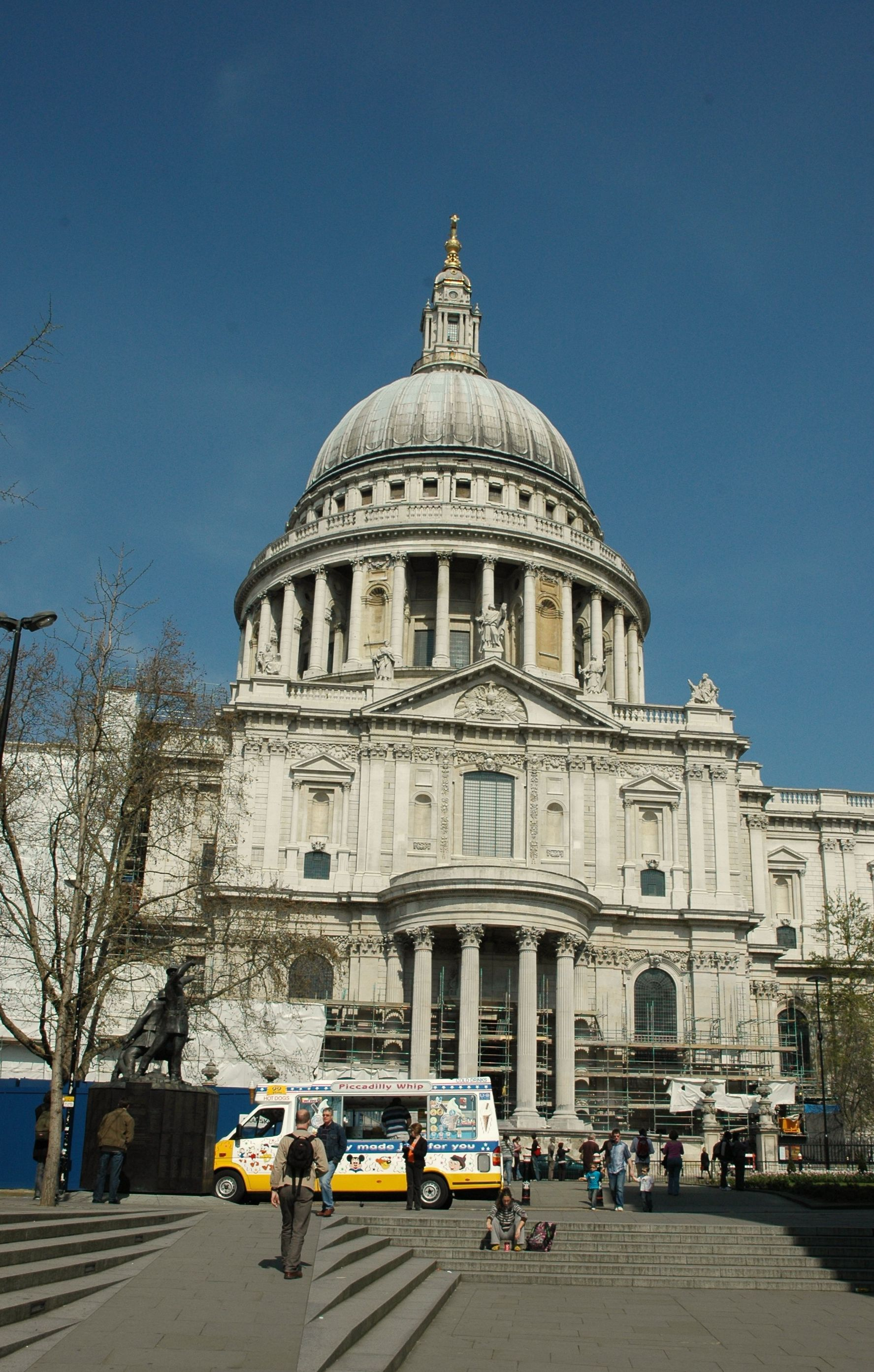 Londres - Catedral de Saint Paul - Llevant